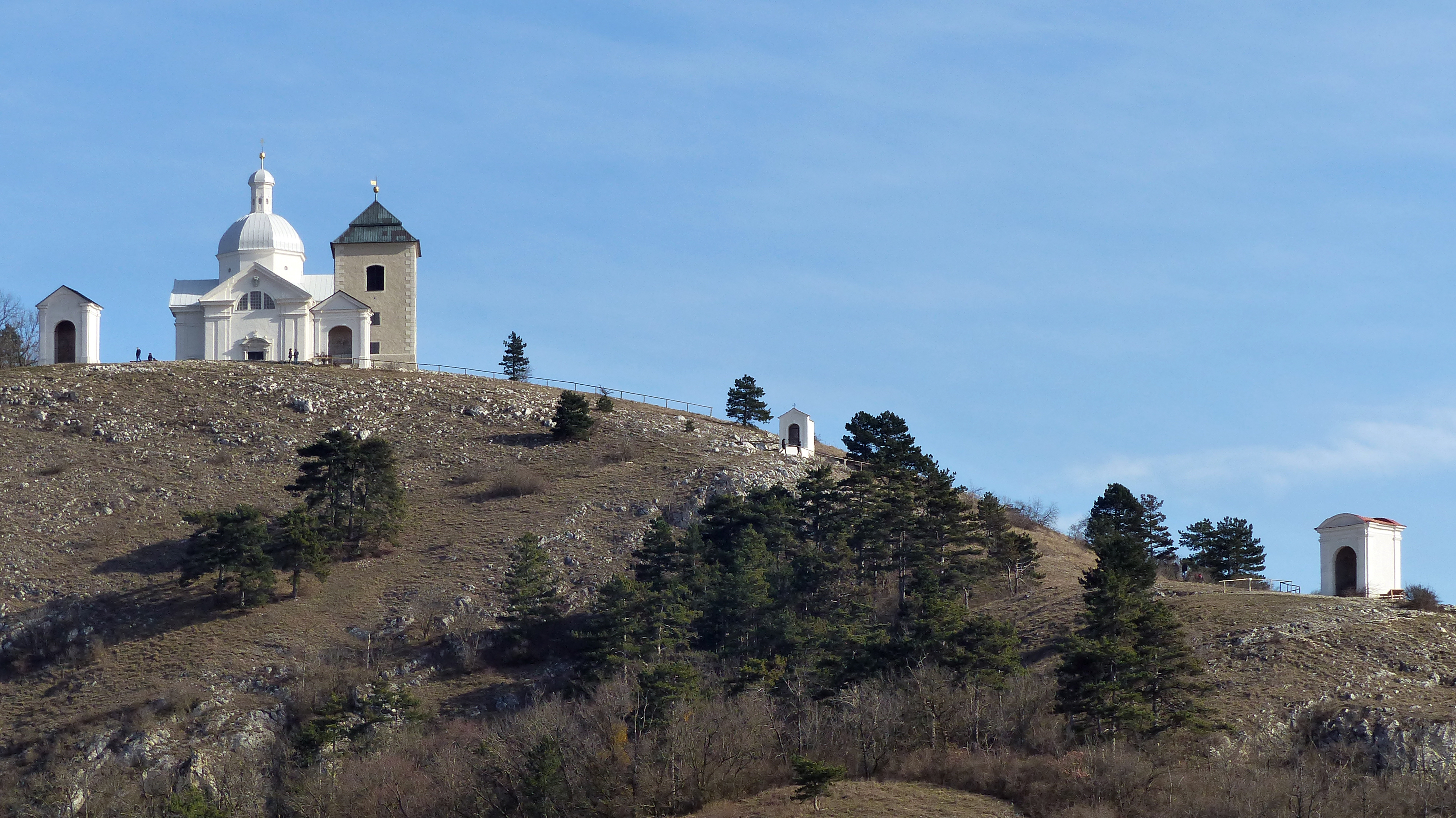 Heiliger Berg bei Mikulov